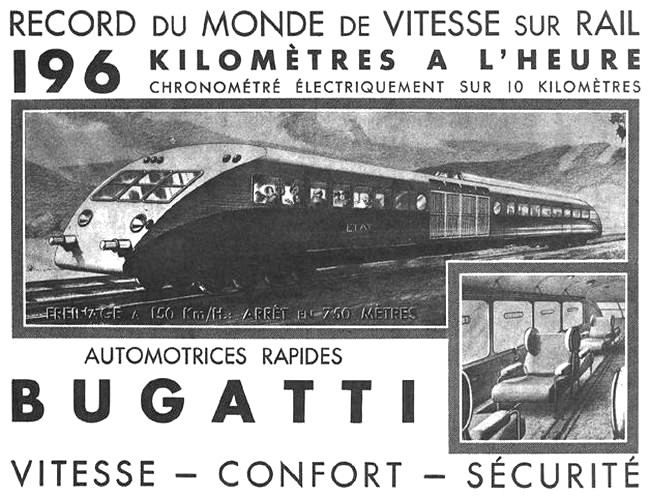 Affiche Bugatti Record du monde de vitesse sur rail, 196 km/h.